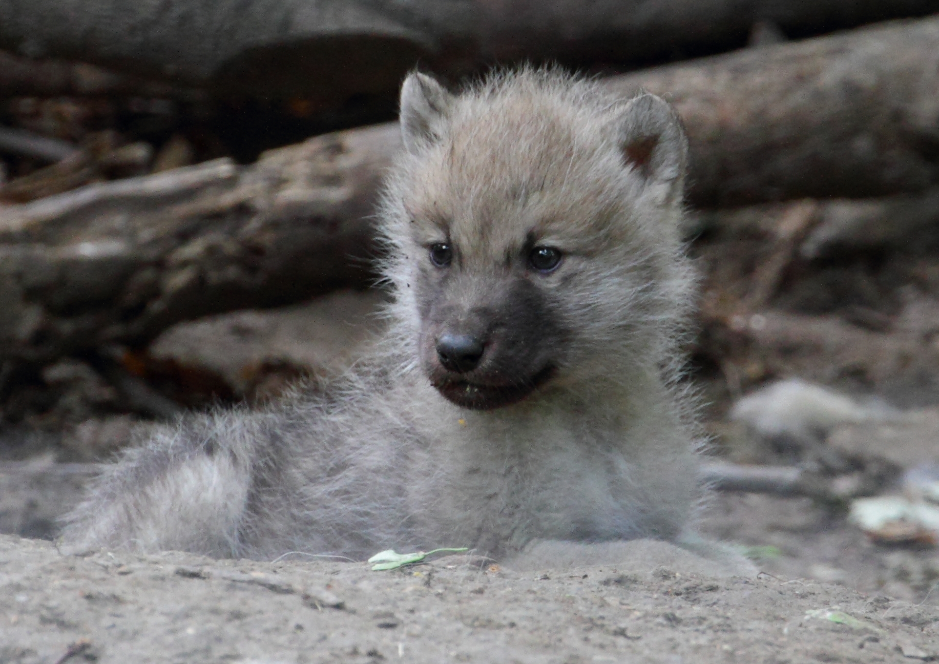 Junger Arktischer Wolf im Tiergarten Schönbrunn.